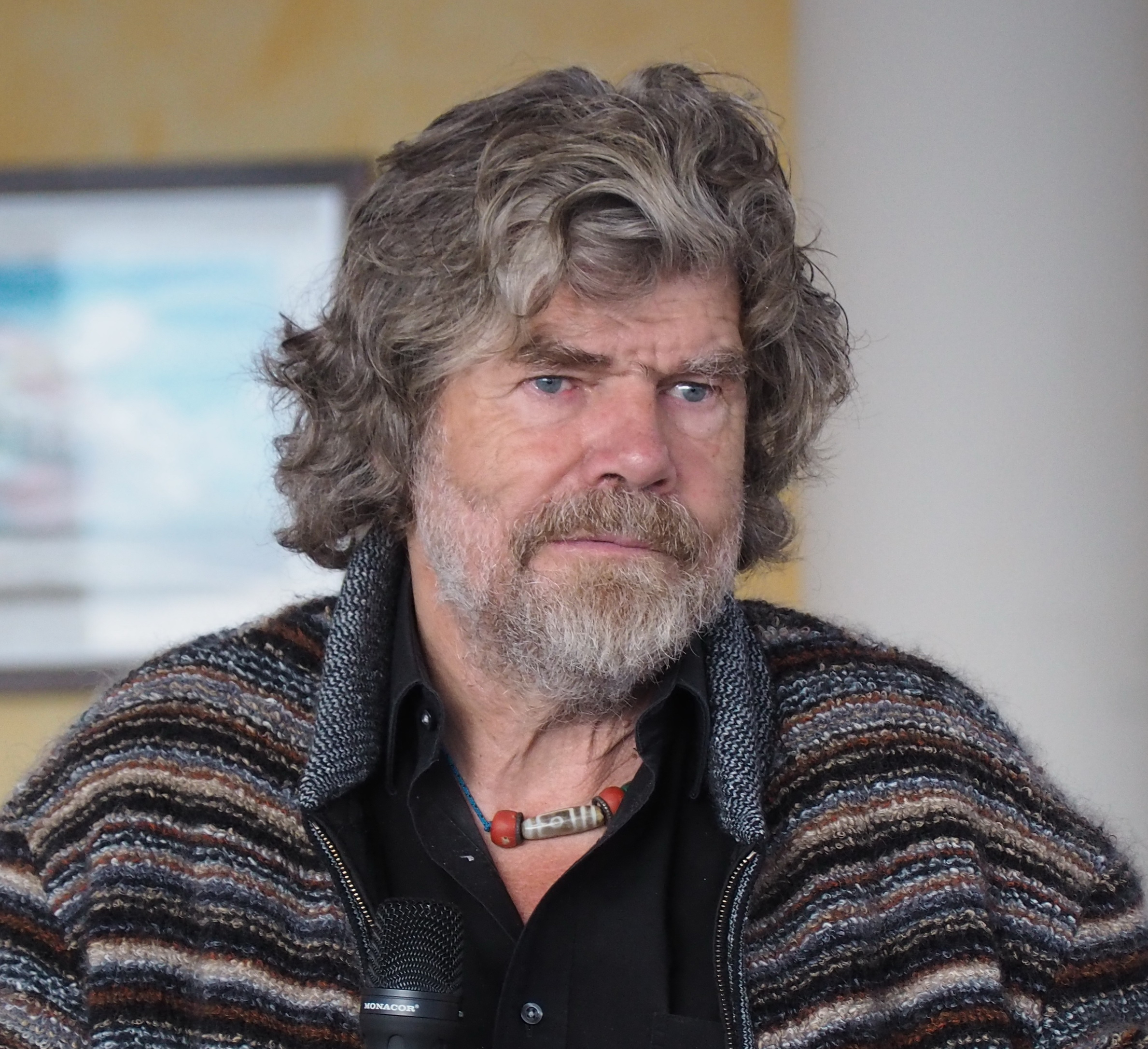 Reinhold Messner im September 2016 bei einem Vortrag auf dem Kronplatz Personality rights warningAlthough this work is freely licensed or in the public domain, the person(s) shown may have rights that legally restrict certain re-uses unless those depicted consent to such uses. In these cases, a model release or other evidence of consent could protect you from infringement claims.